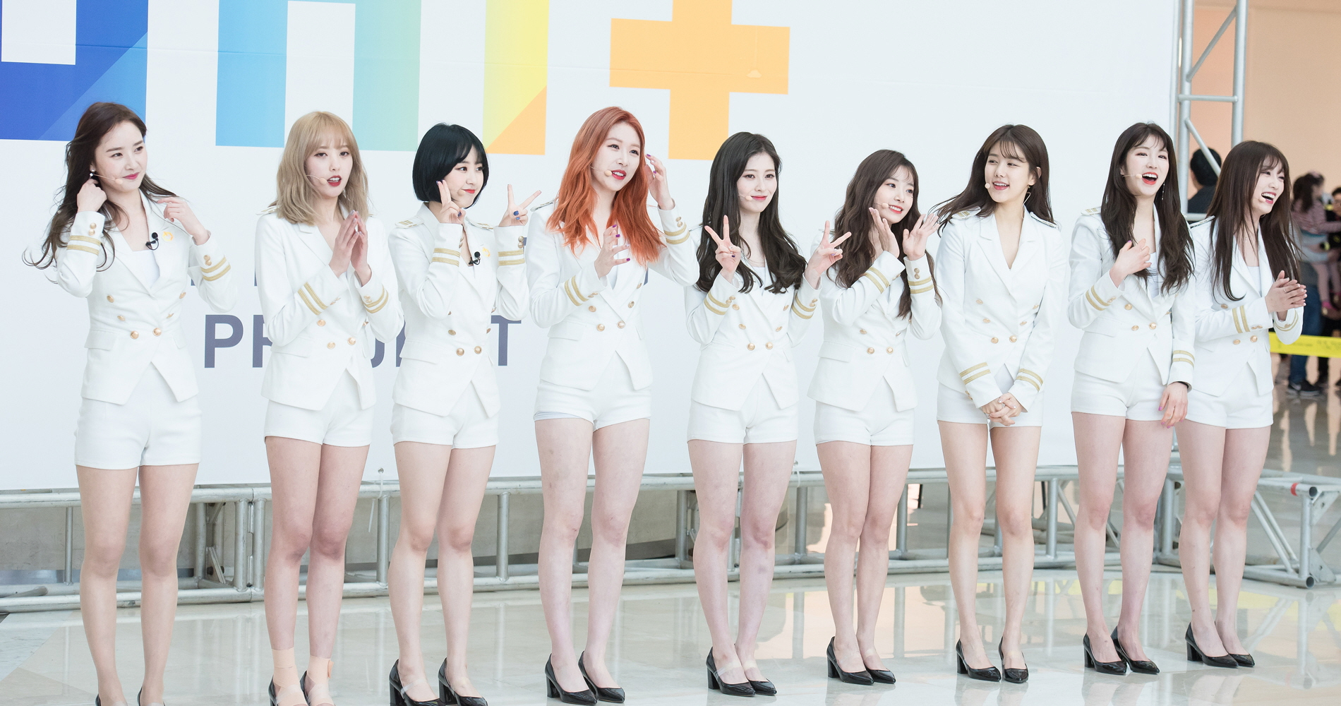 180211 더유닛 유닛G